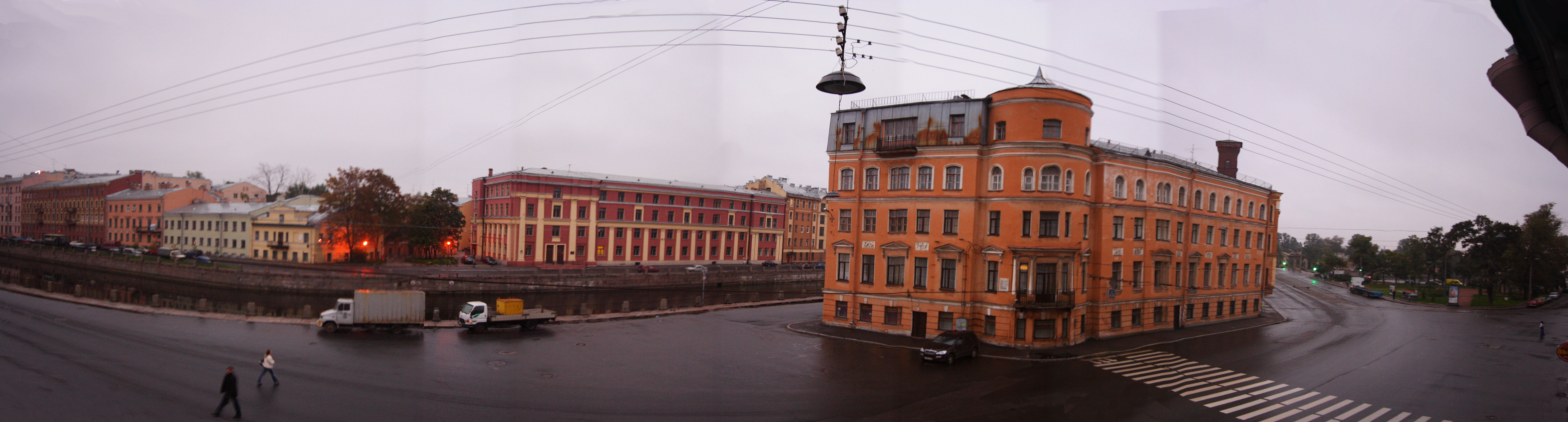 Площадь Репина в Санкт-Петербурге